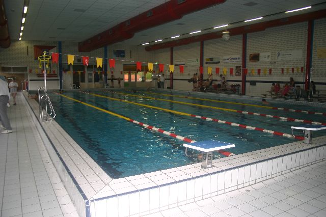 Het wedstrijdbad in zwembad de wisselslag te Blerick.